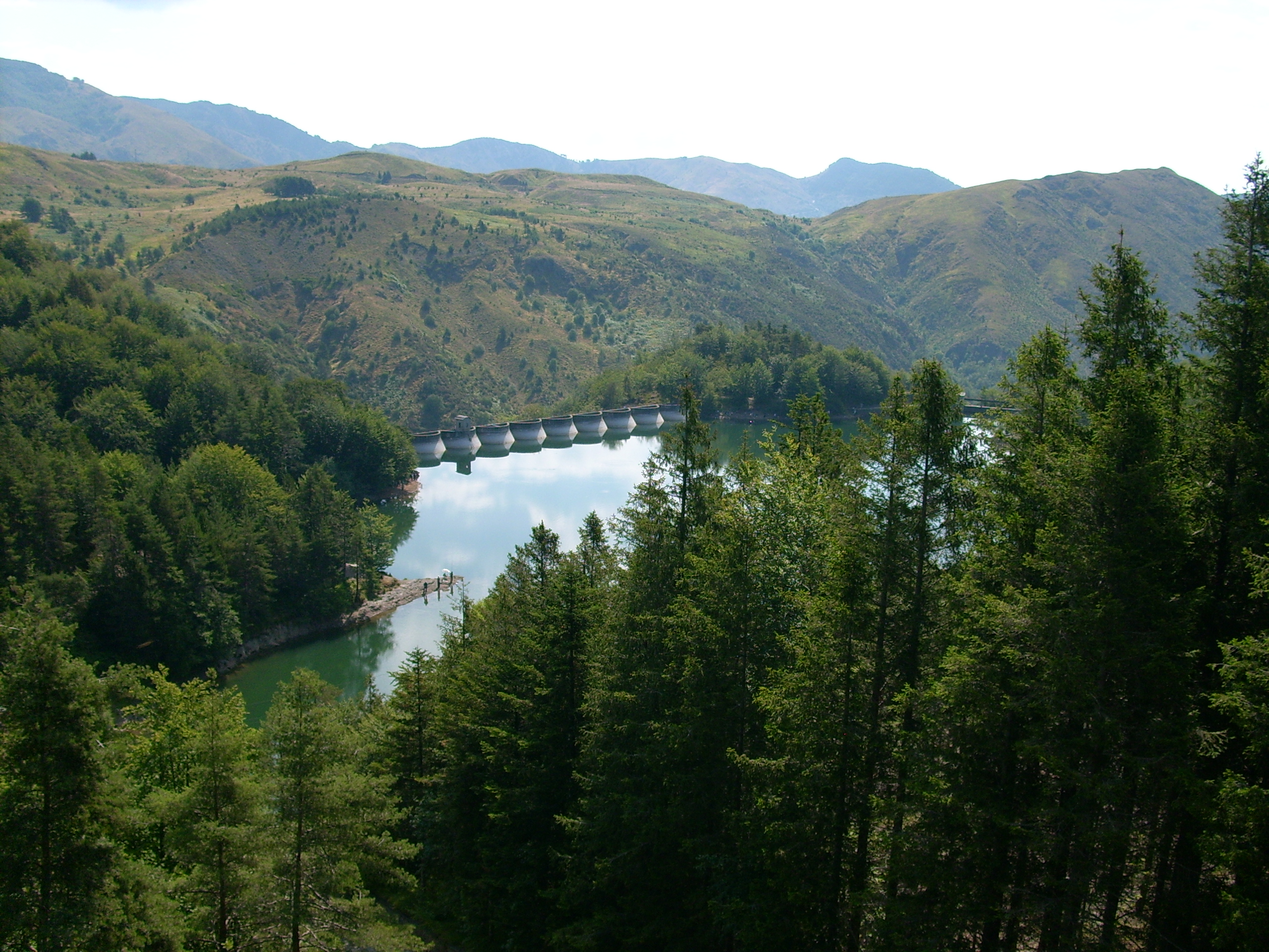 Lago di Pian Sapeio presso Borzonasca, Liguria, Italia